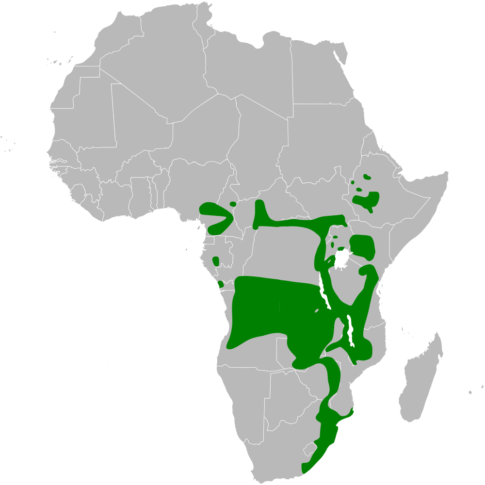 Iduna natalensis distribution map, based on